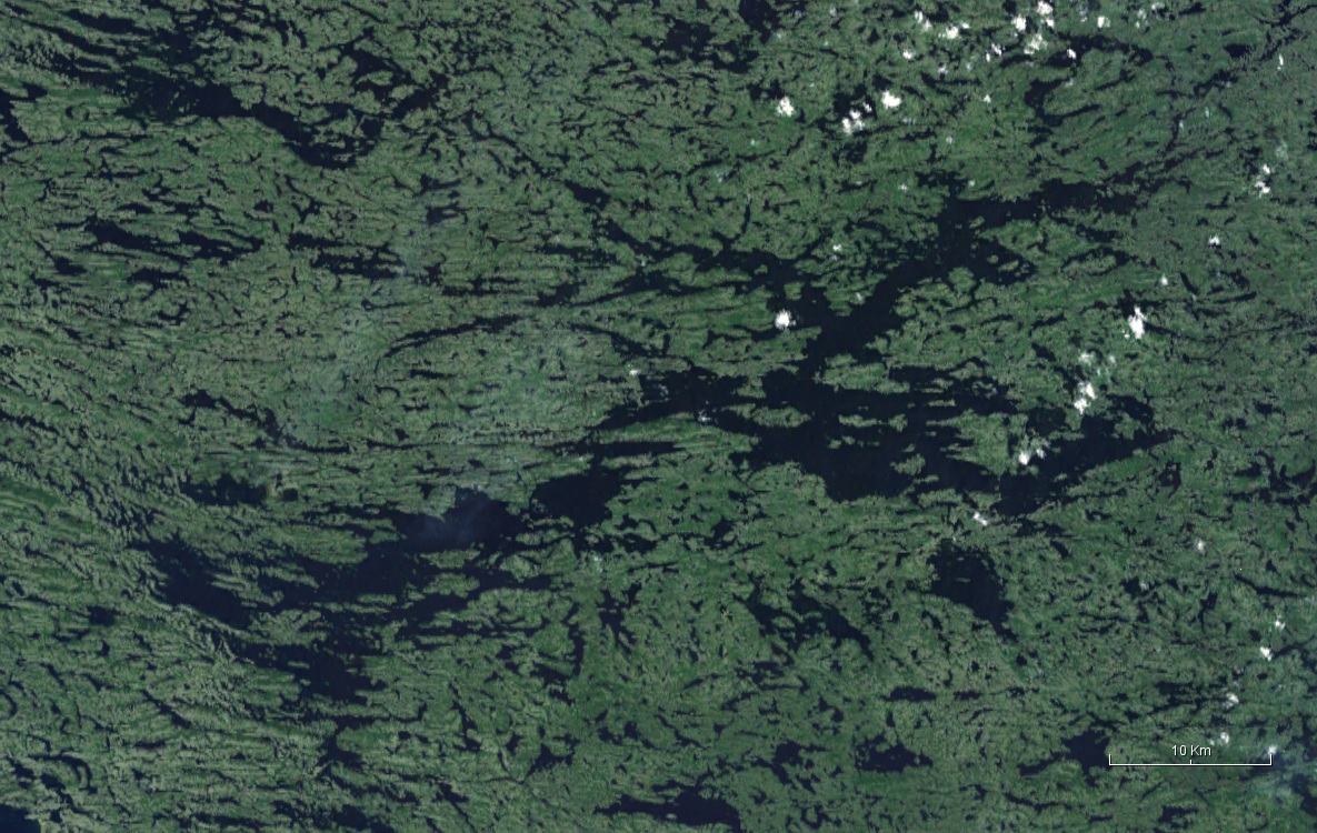 Lacs des Loups Marins, Québec